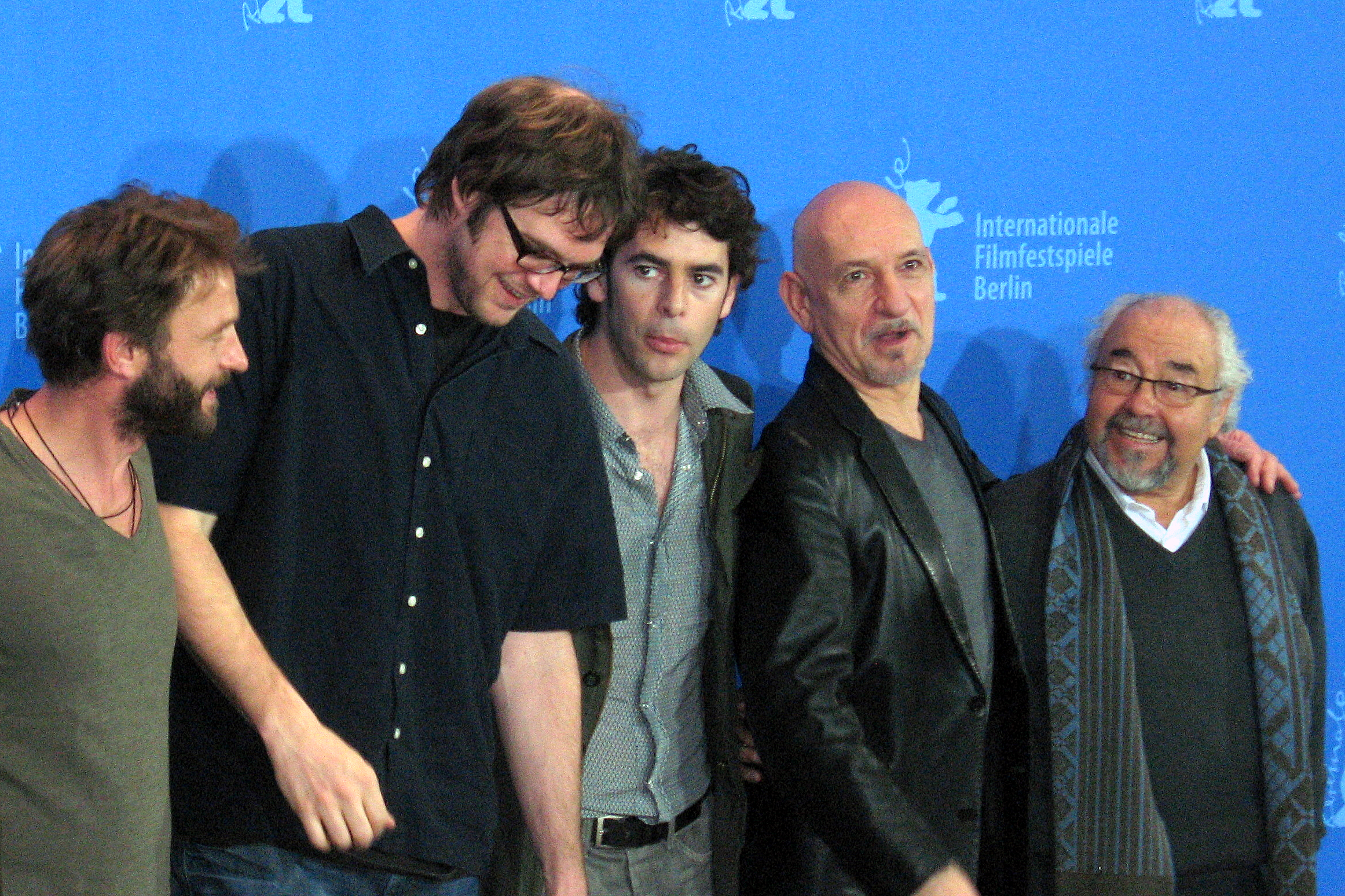 Pressekonferenz zum Film Transsiberian in Berlin auf der Berlinale. v. l. n. r. Thomas Kretschmann, Brad Anderson, Eduardo Noriega, Ben Kingsley, Julio Fernández